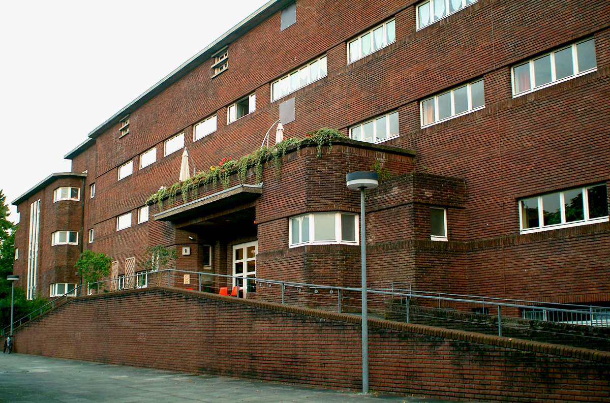 Blick schräg entlang der Auffahrt zum Eingang des Heinemanhofes in Richtung Brabeckstraße ...